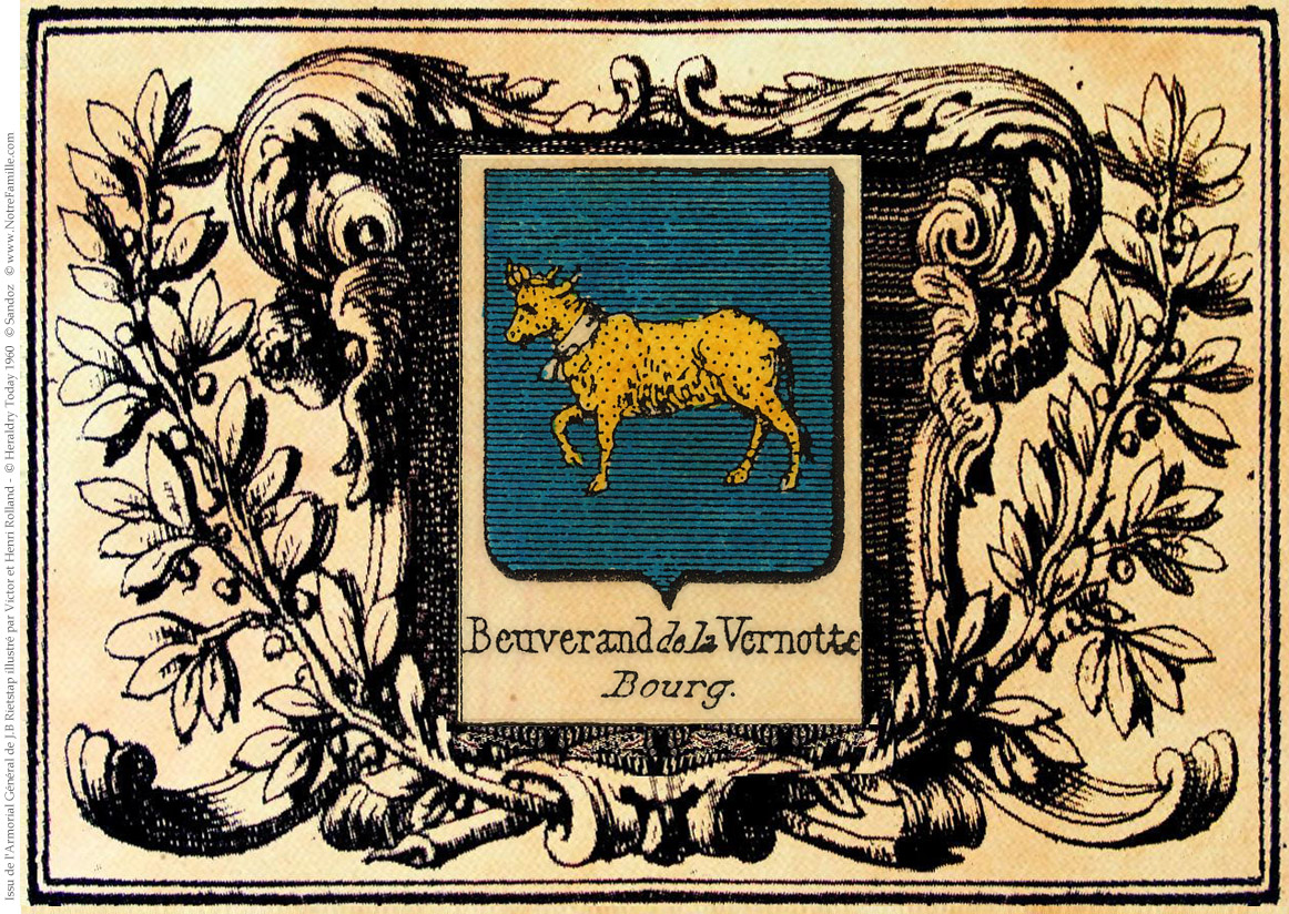 Blason-Beuveranddelavernotte